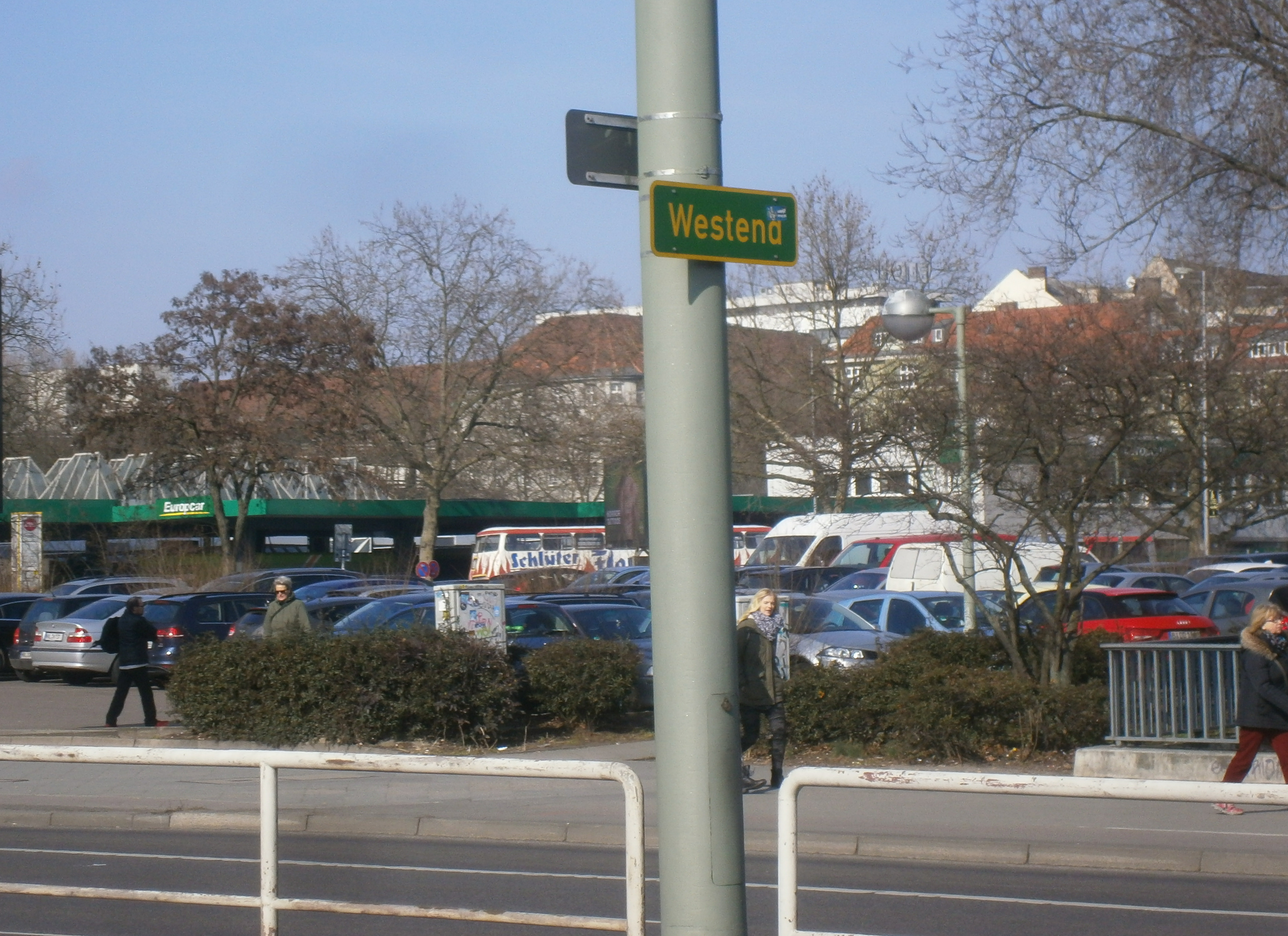 Die Ostpreußenbrücke im Berliner Bezirk Charlottenburg-Wilmersdorf überführt die Neue Kantstraße zwischen dem Ortsteil Charlottenburg und Westend über die Berliner Ringbahn und den Stadtautobahnring B 100. Im Bild die Ortshinweistafel Westend auf der Mitte der Brücke, oberhalb zwischen der westlichen A100-Fahrbahn und dem Westrand der Bahnfläche.